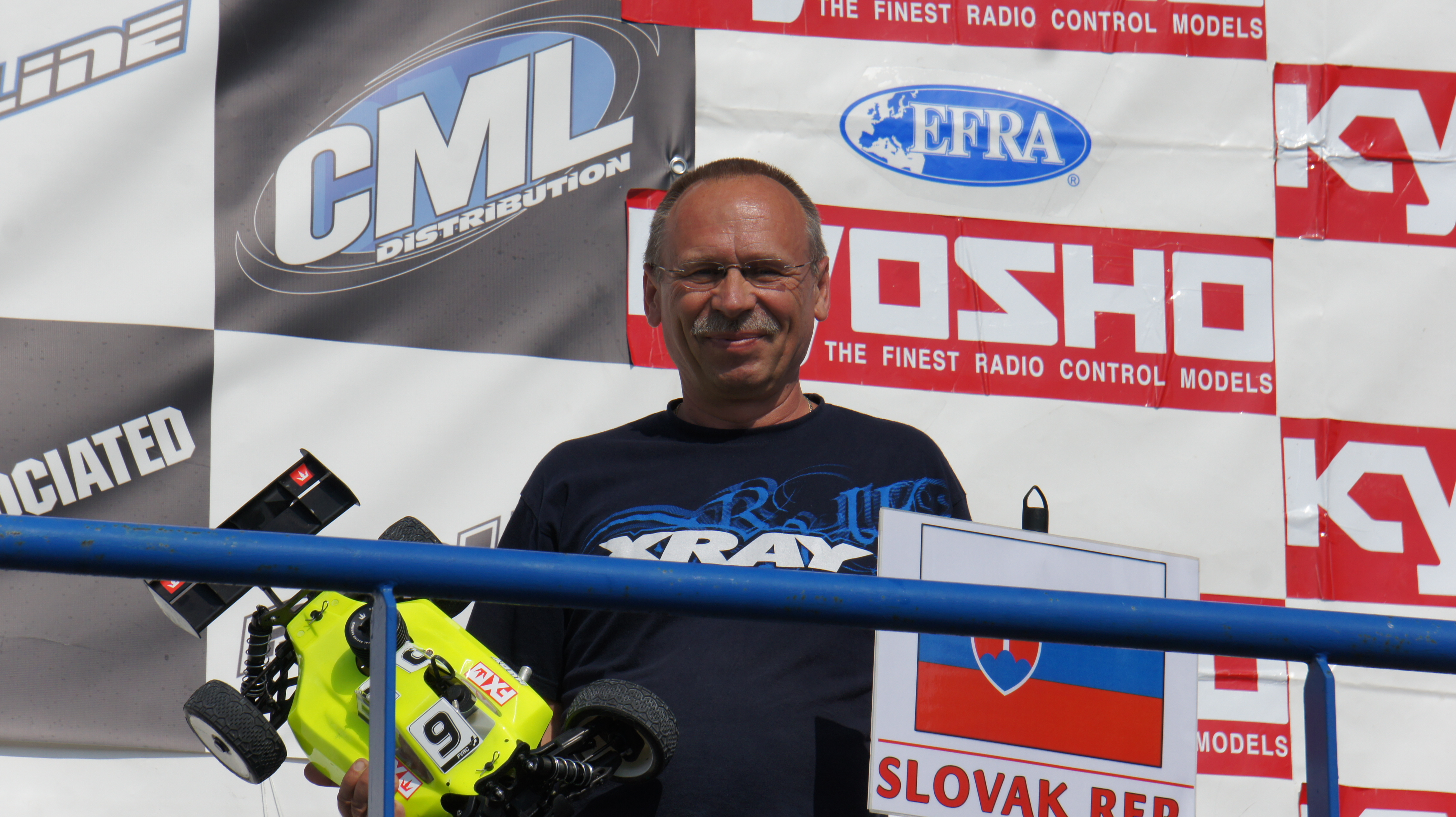 Juraj Hundi concourant pour l'équipe de Slovaquie.